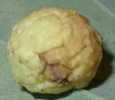 Makroaufnahme eines Gallapfels